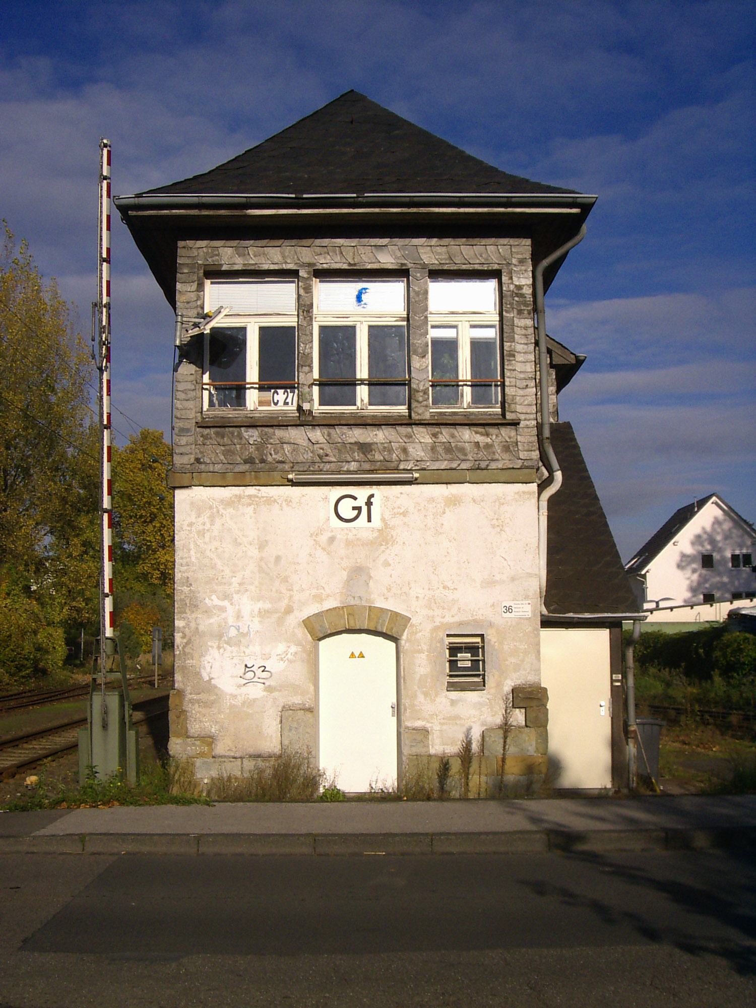 Historisches Stellwerk "Gf", Tannenbergstraße, Bergisch Gladbach. Baujahr 1911.